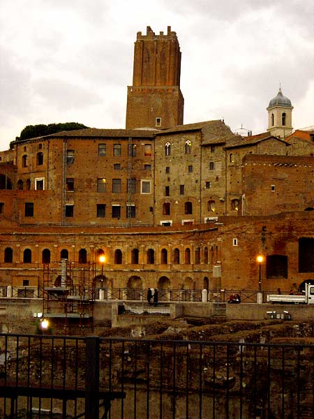 Roma - La Torre delle Milizie vista da un'angolazione che ne mette in risalto la pendenza. Immagine da me ripresa e concessa in PD - 01:31, 28 dic 2006 (CET)